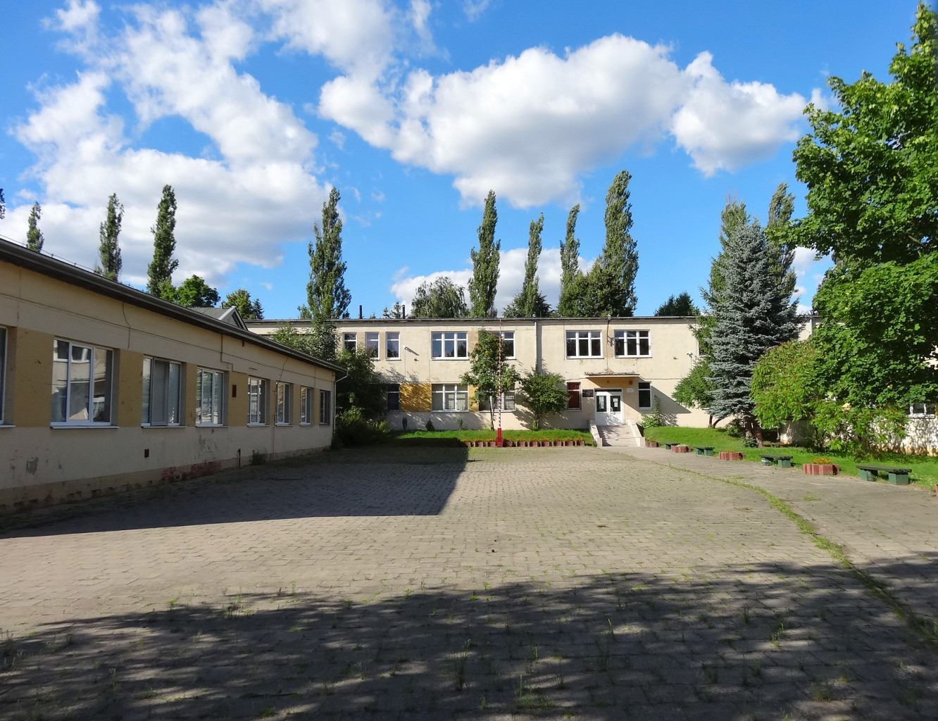 Osiedle Siernieczek w Bydgoszczy, Zespół Szkół nr 17